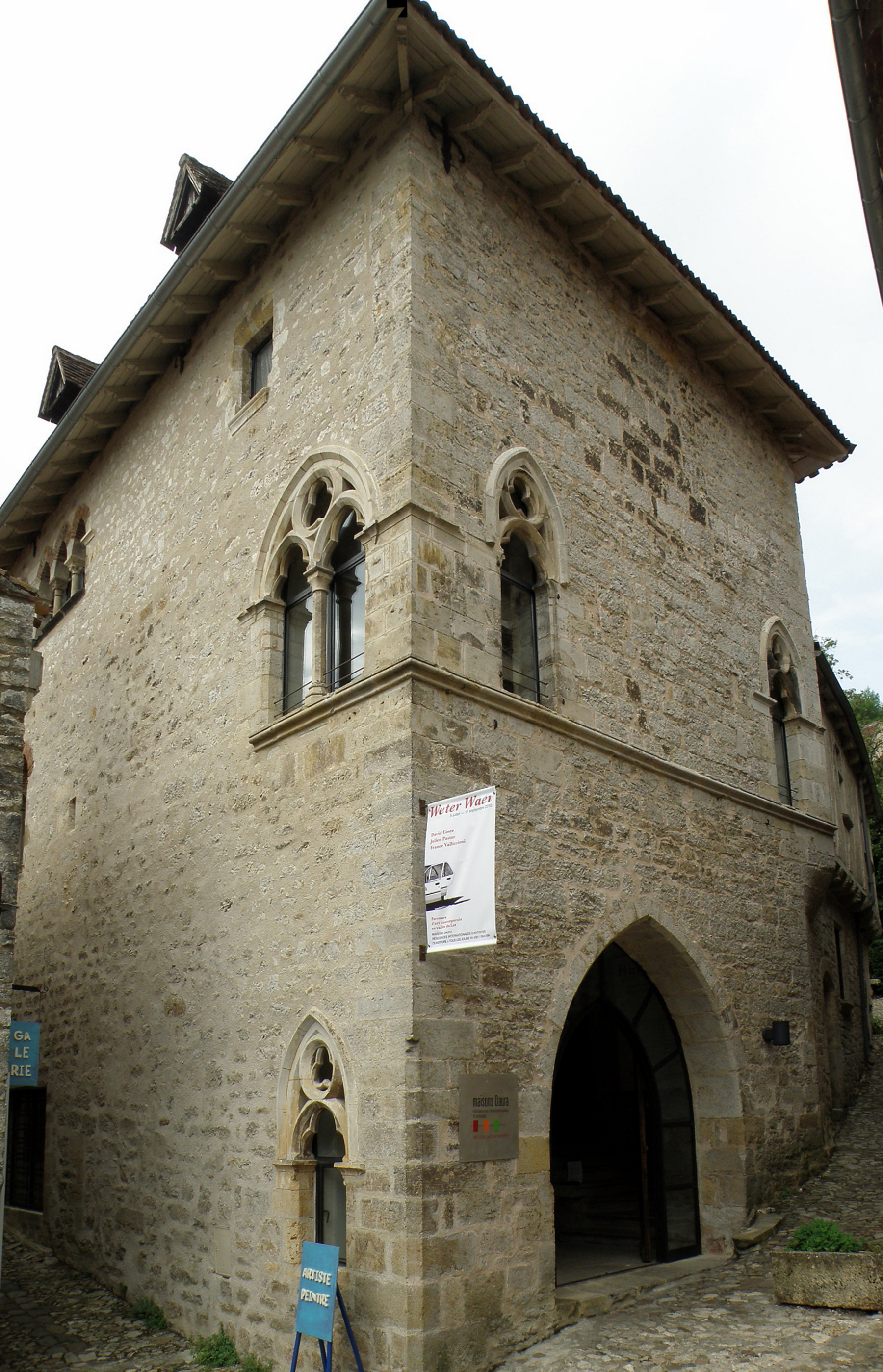 Saint-Cirq-Lapopie (Lot, France). Ancien hôpital, dit maison Daura.